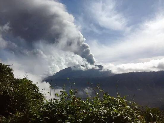 Erupción freática del volcán Turrialba en octubre 2014, Costa Rica.